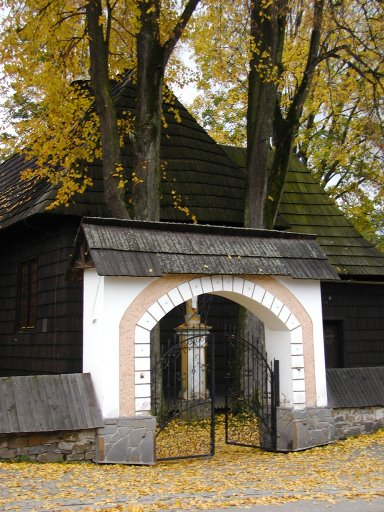 Church in Jurgów, autumn 2007